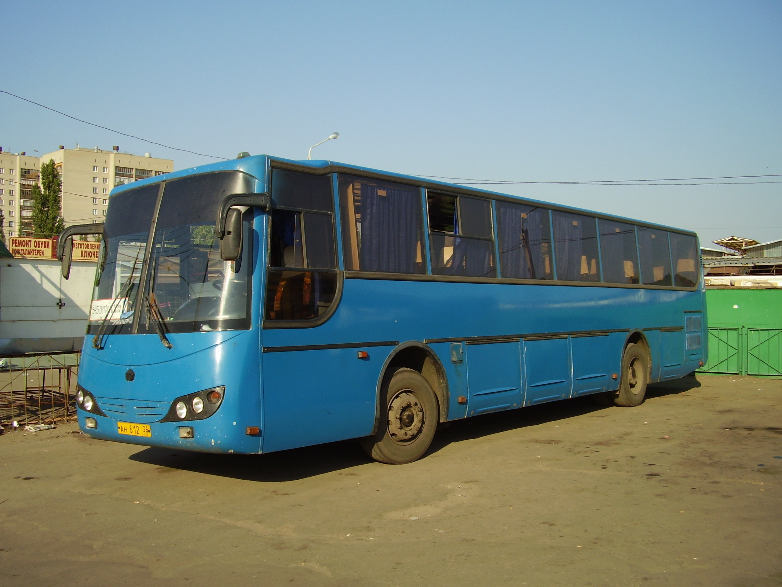 Автобус МАРЗ-5277-01, Воронеж--Острогожск - Bus MARZ-5277-01, Voroneg-Ostrogogsk